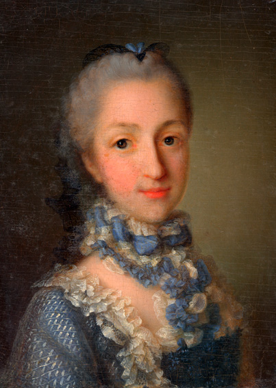 Photo d'un tableau représentant Françoise de Chalus (1734-1821